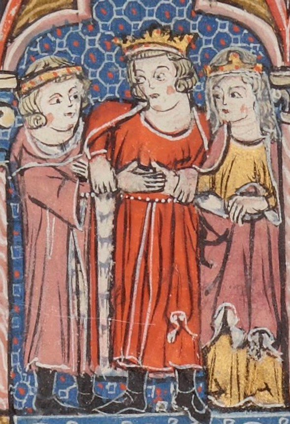 Mariage d'Onfroi IV de Toron et d'Isabelle de Jérusalem